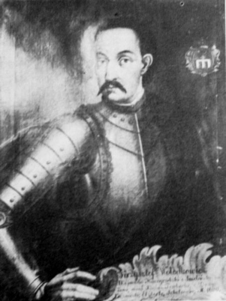 Беларуская (тарашкевіца): Партрэт Крыштапа Валадковіча (Kryštap Vaładkovič)